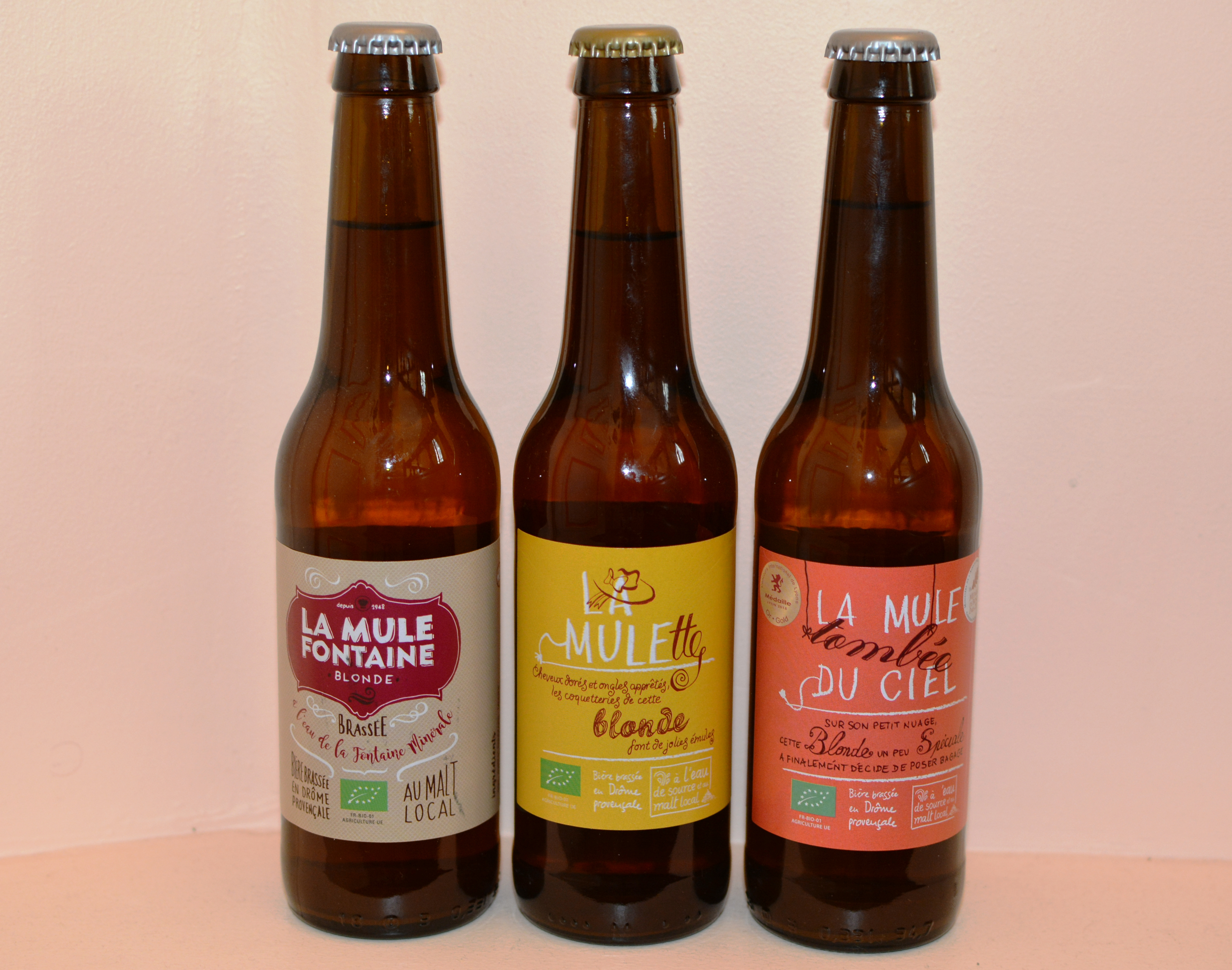 Trois bouteilles de bière de la brasserie La Vieille Mule dans la Drôme en France.